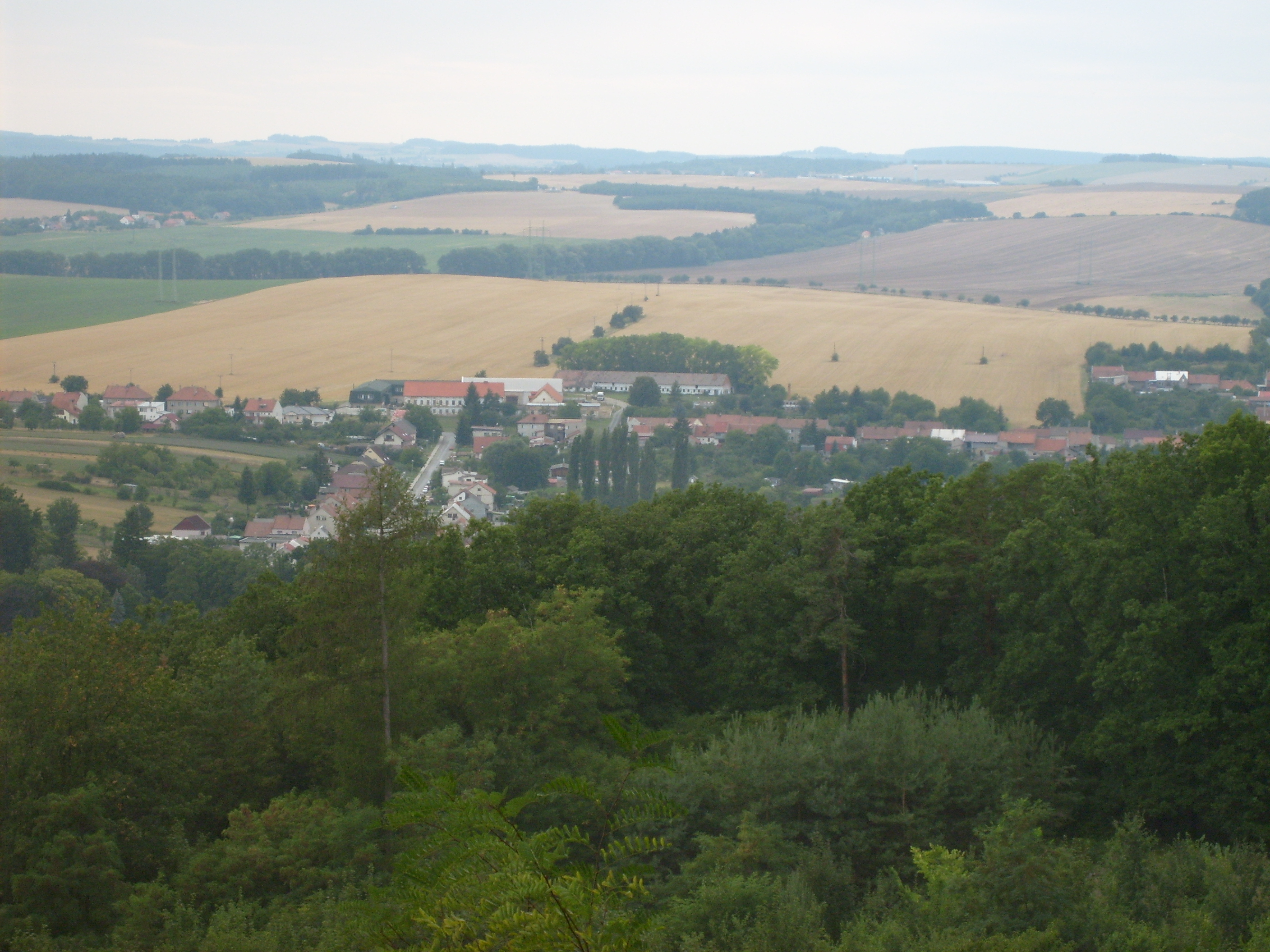 View of Čechy pod Kosíře from Velký Kosíř, Olomouc Region, Czech Republic